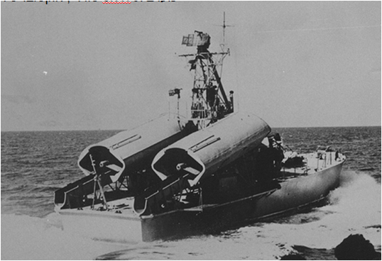 ספינת טילים מצרית קומאר במפרץ סואץ בקרבת דבור ישראלי